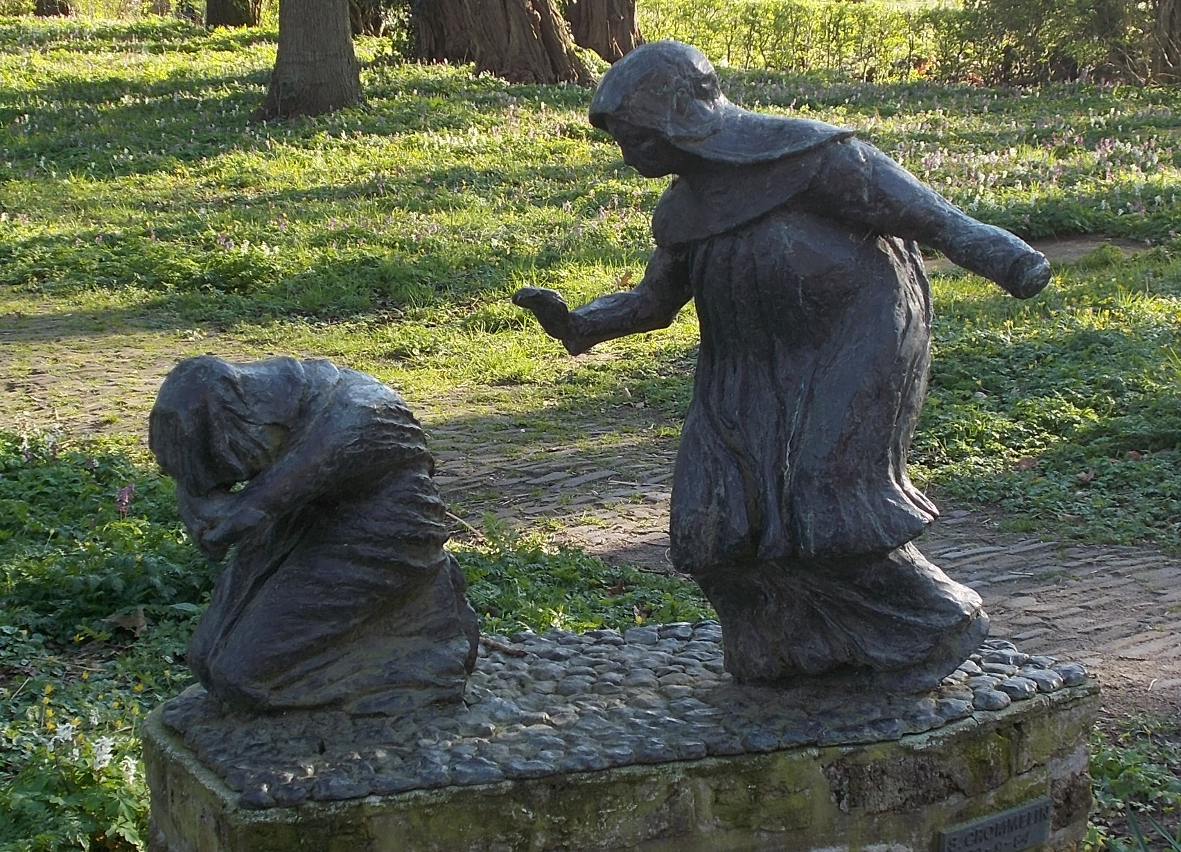 Bemoediging.Een oudere kloosterzuster bemoedigt een noviet.Brons in 1984 geplaatst op het Kerkplein bij de voormalige kloosterkerk van Diepenveen. Gemaakt door Samuel Crommelin. Gefotografeerd in maart 2014 en gestolen in oktober van dat jaar. Replica geplaatst in 2016.